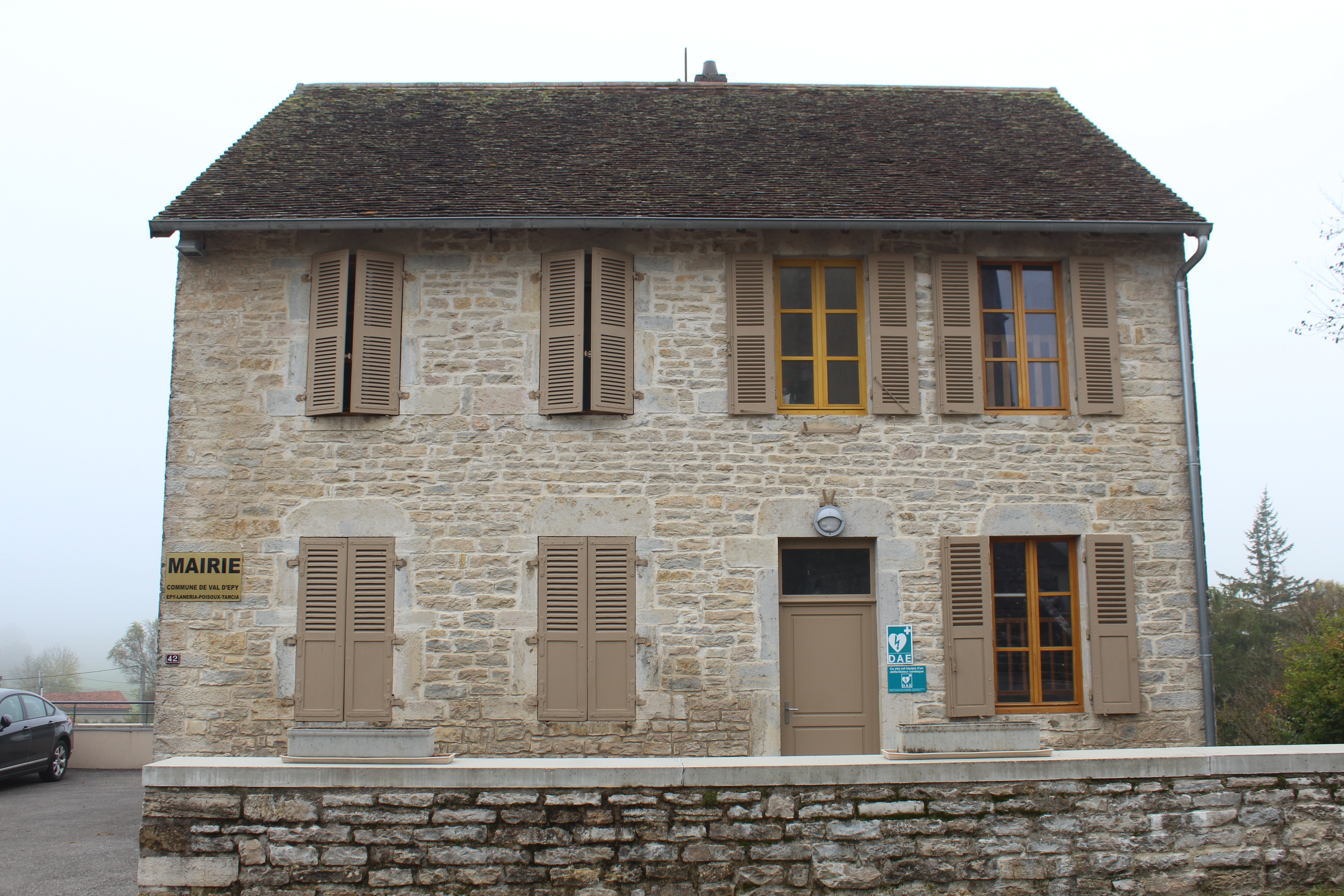 Mairie de Val-d'Épy.